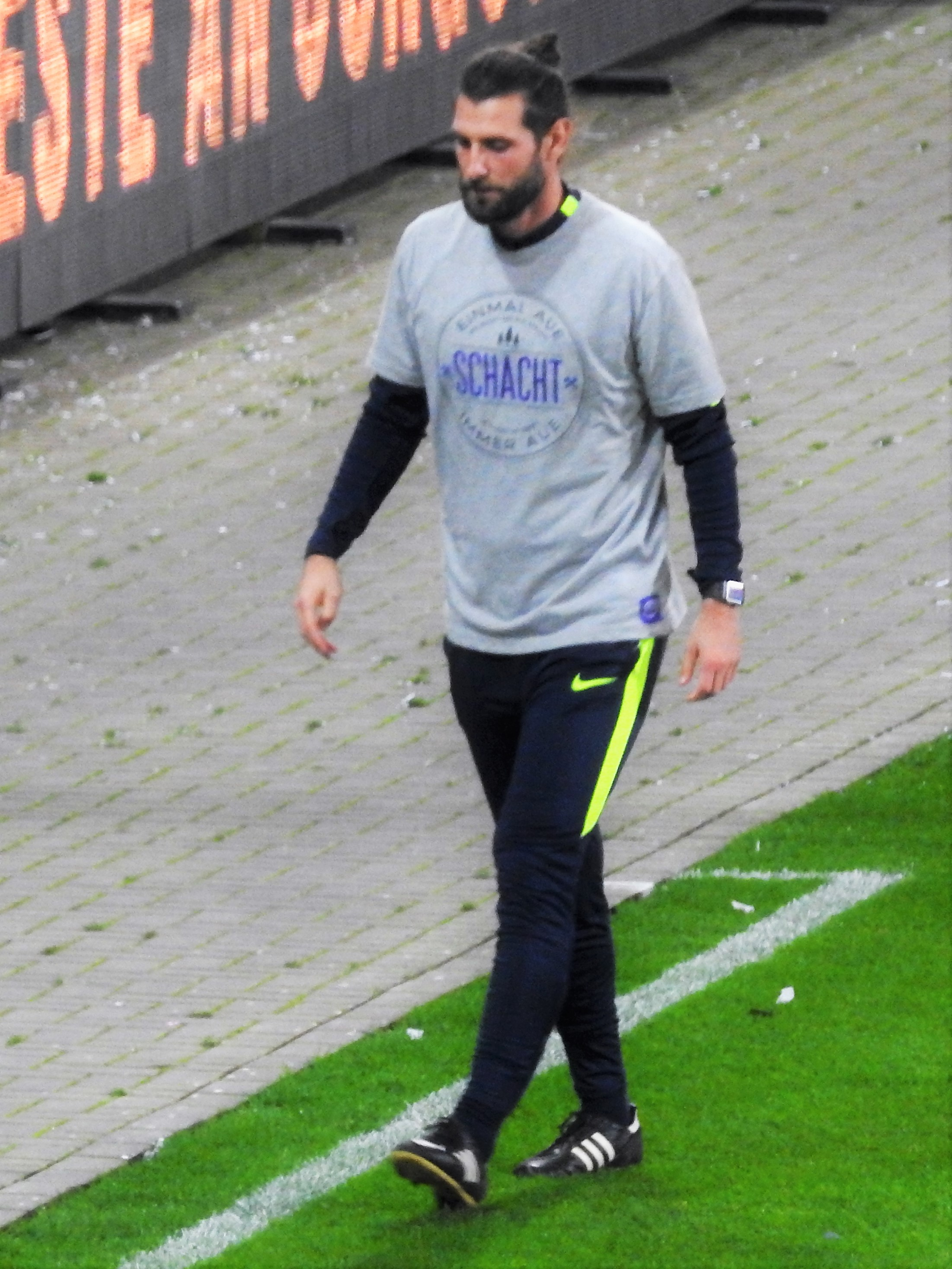 Lenk, Robin TW-Trainer Aue 17-18